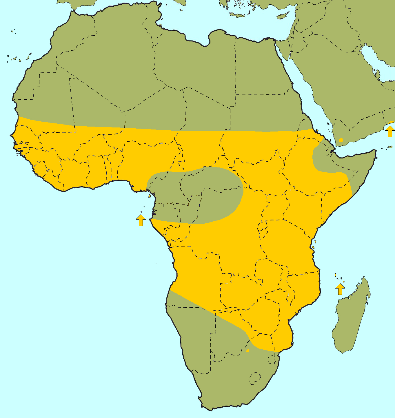 Air de répartiton